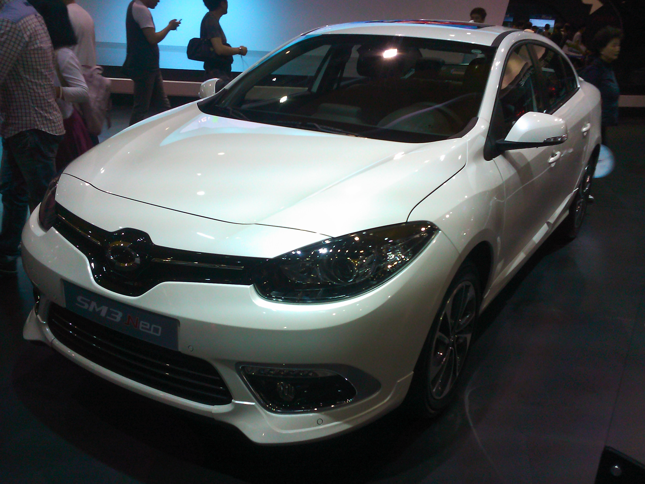 ルノーサムスン・SM3